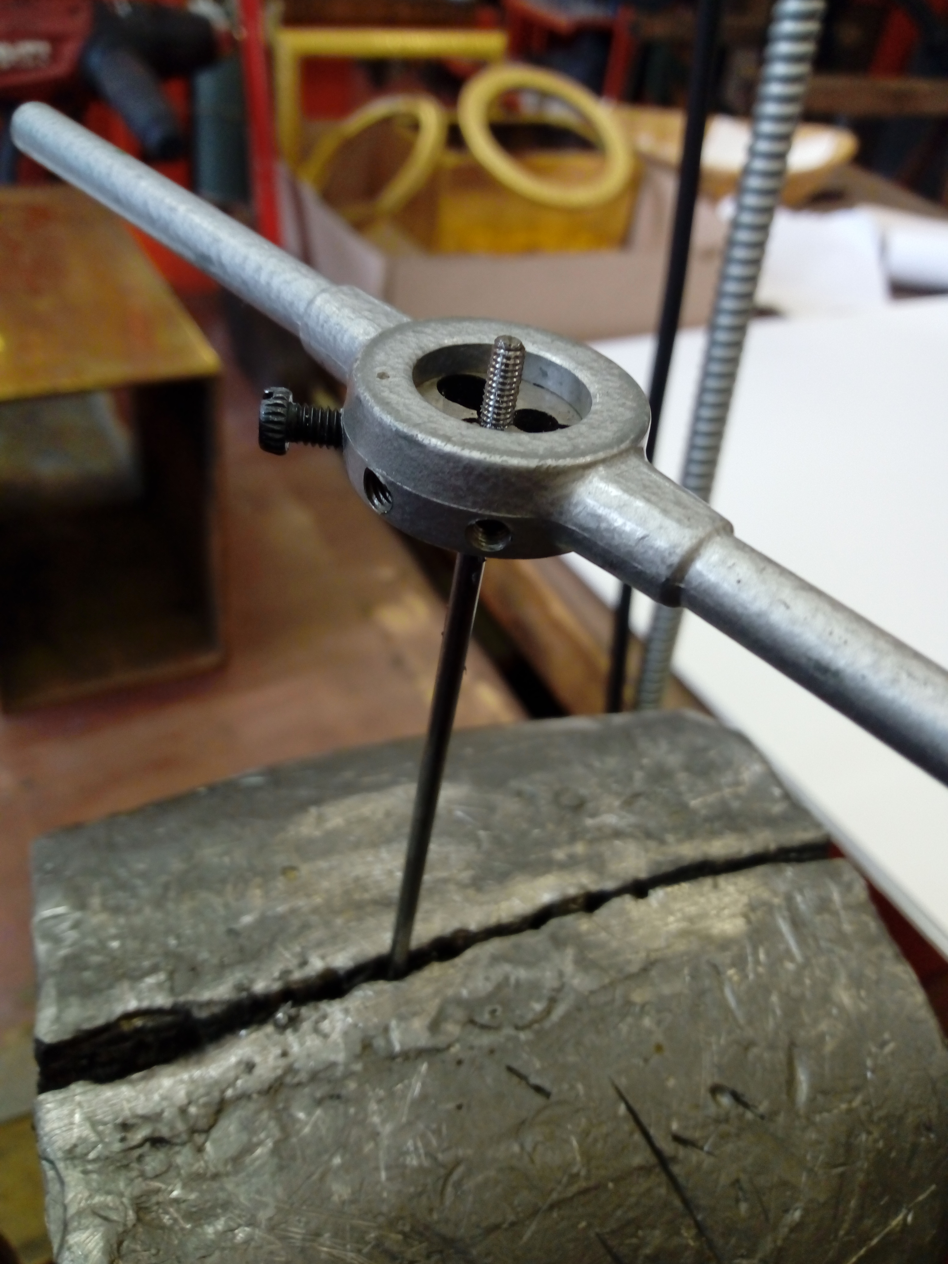 A l'aide d'une filière montée sur un porte-filière, la tige est filetée.